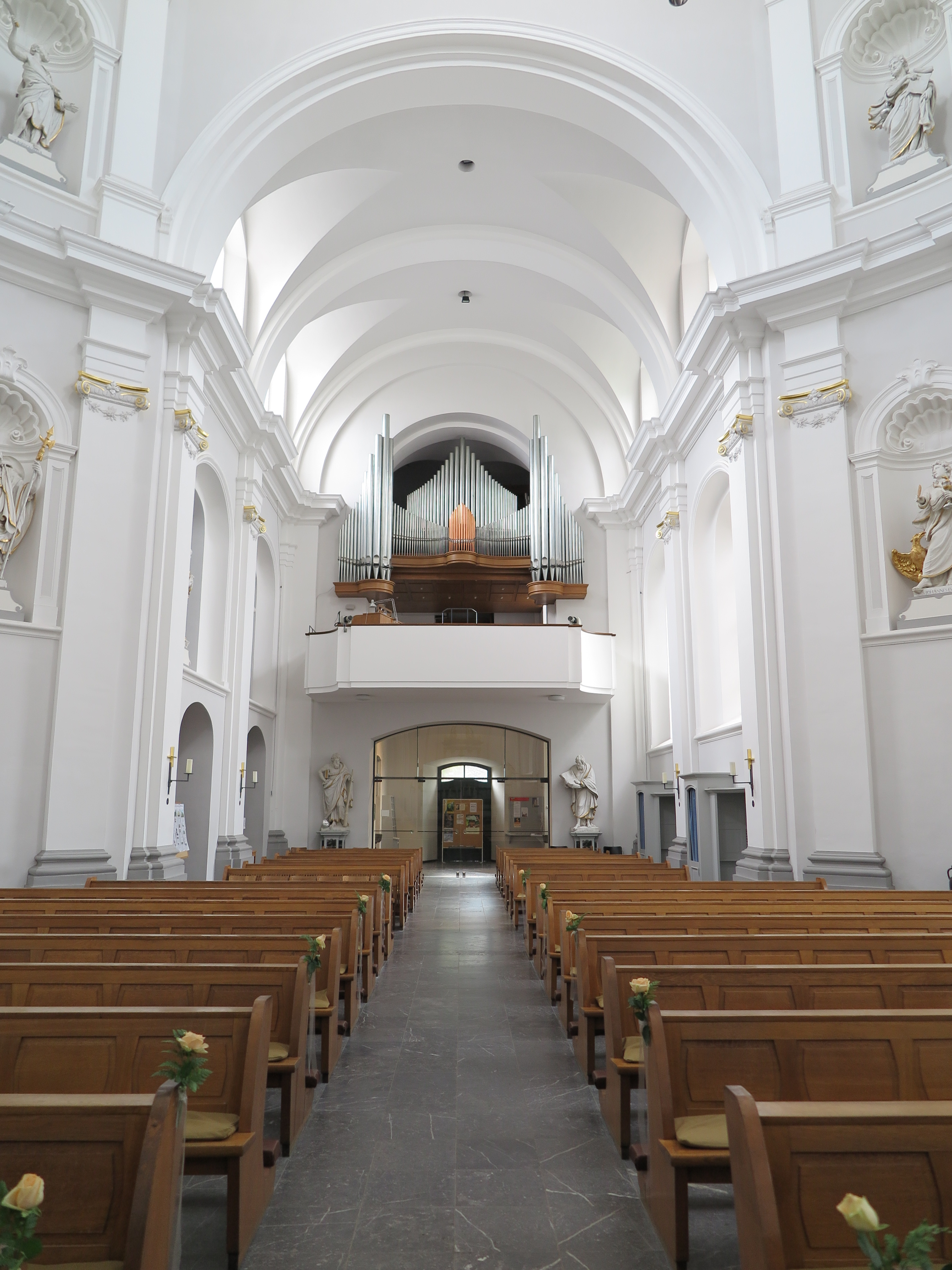 Blick zur Orgelempore in St. Johann Baptist in Aachen-Burtscheid.